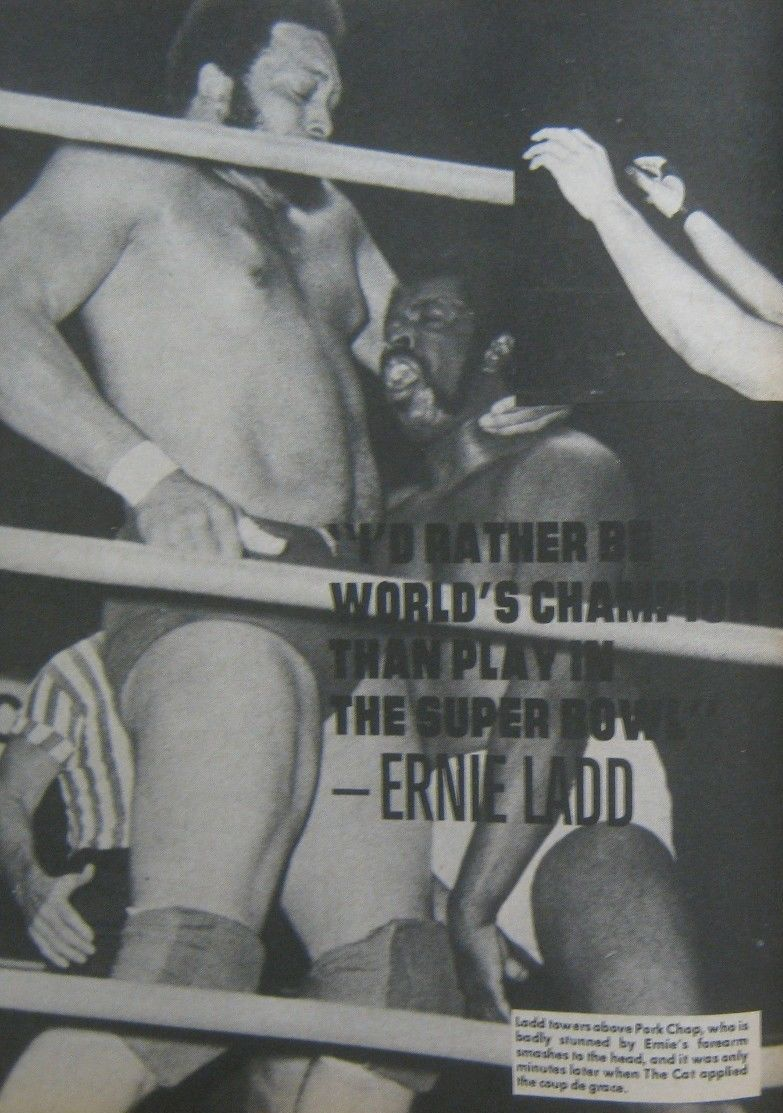 Ernie Ladd and Park Chap dans le magazine de catch Wrestling Annual de juin 1975. - I would rather be world's champion than play in the Super Bowl